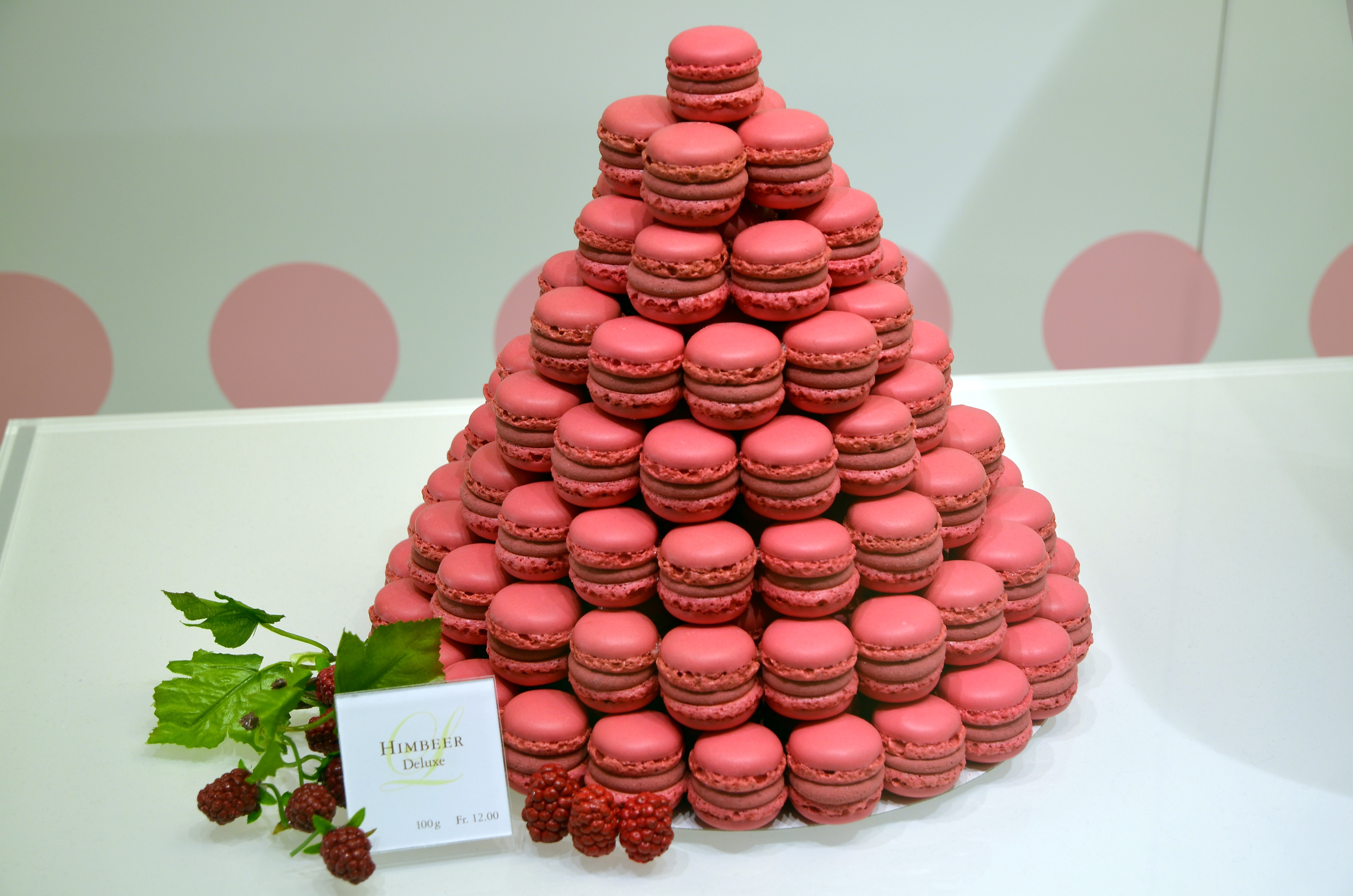 Luxemburgerli Himbeer Deluxe, Conditorei Sprüngli, Glattzentrum in Wallisellen (Switzerland)